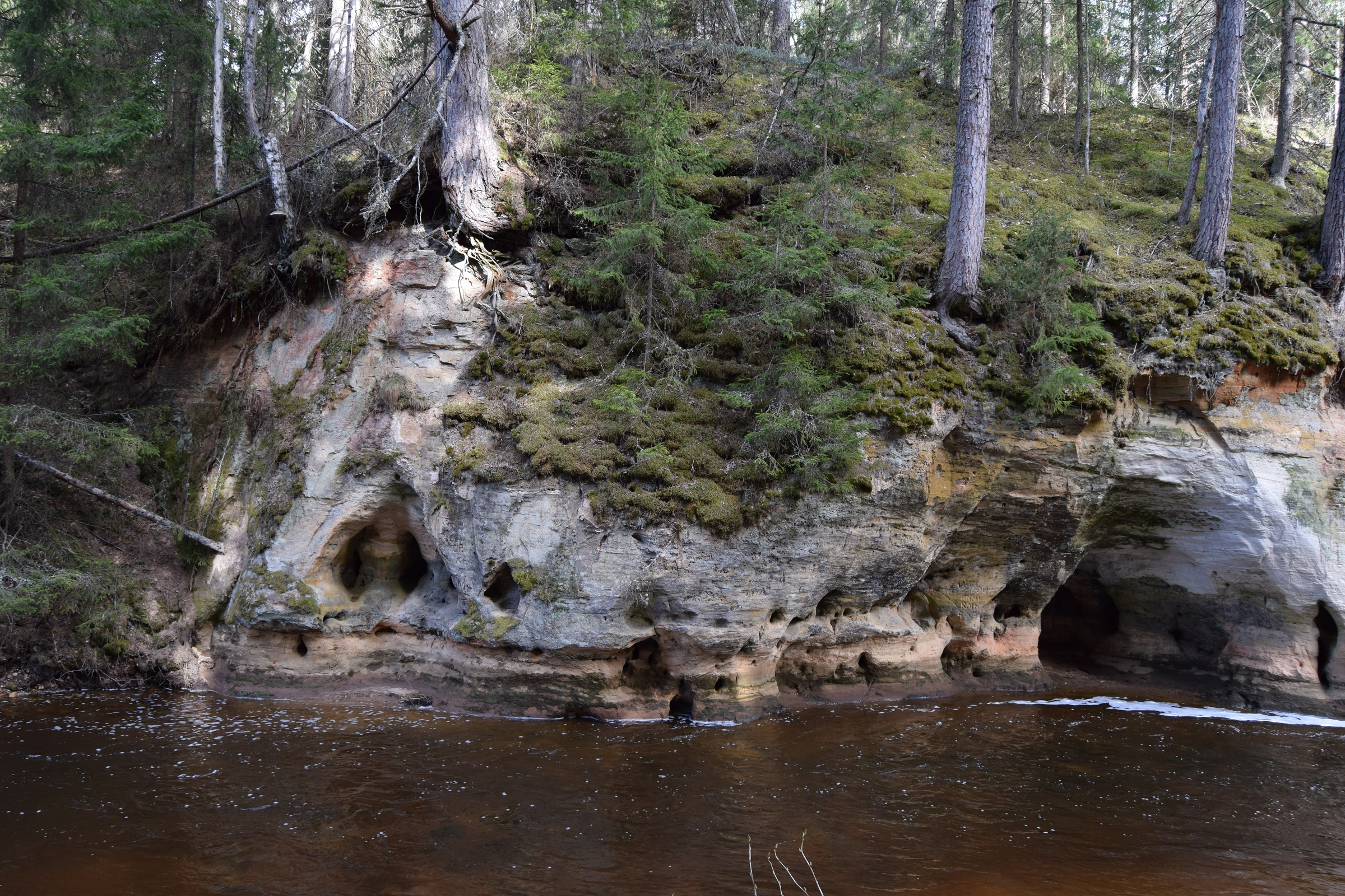 Kalmõtu müür